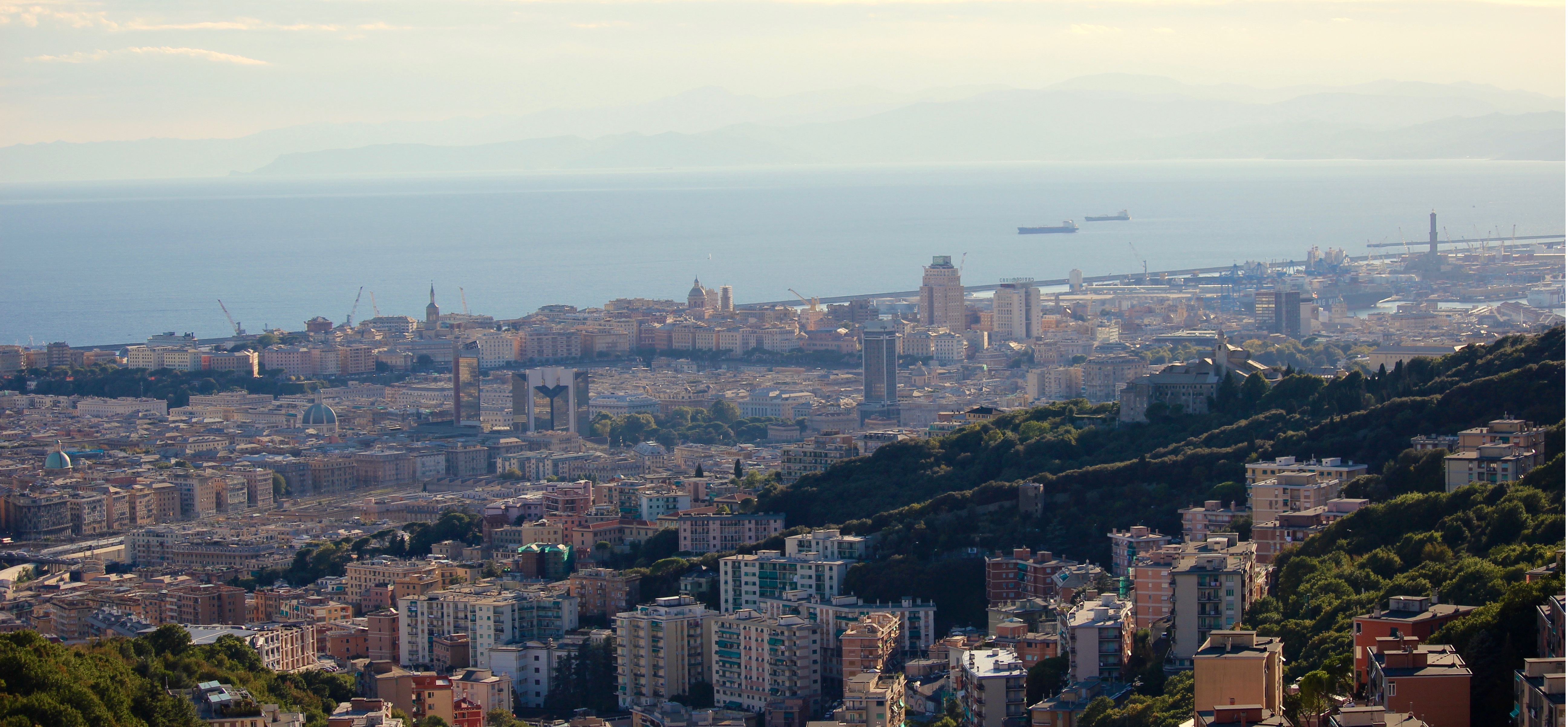 Una foto panoramica di Genova: si vedono Lanterna, Corte Lambruschini, il centro e il Porto del capoluogo ligure.